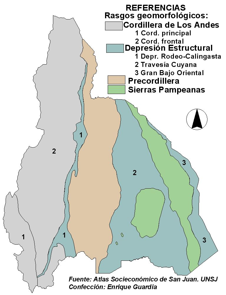 Mapa que representa la distribución de los rasgos geomorfológicos de la Provincia de San Juan, Argentina